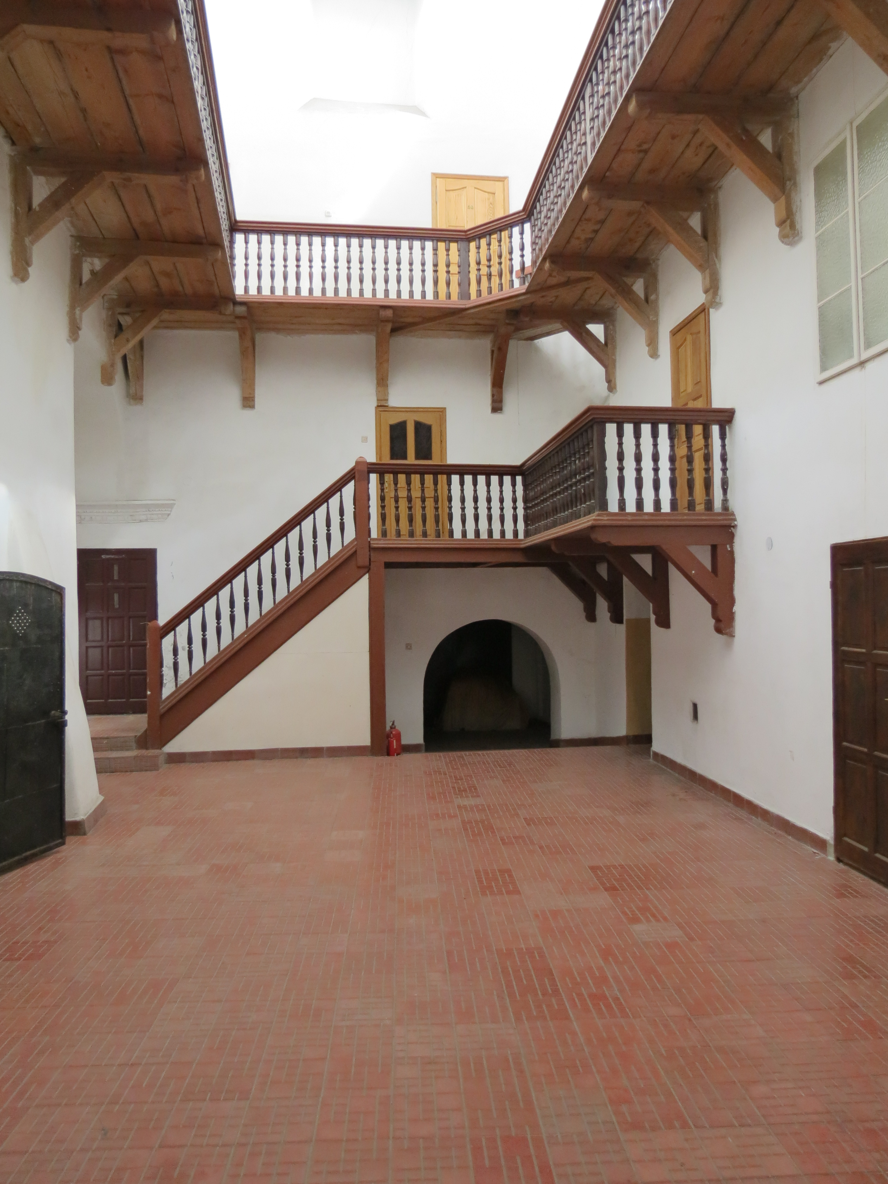 Jarosław, kamienica, XVII, XIX